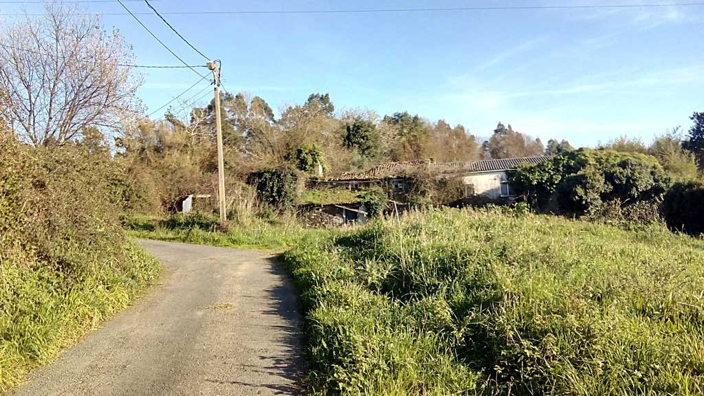 Vista de Guiove, Sedes.